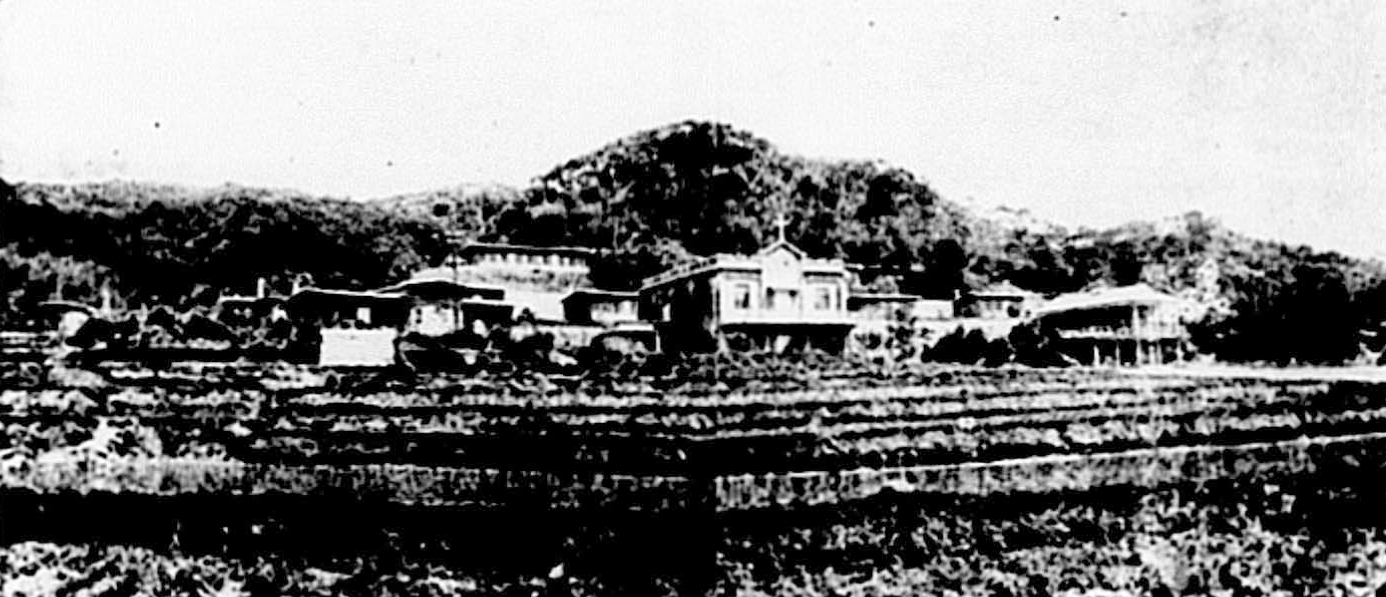 中文（台灣）: 樂山園全景